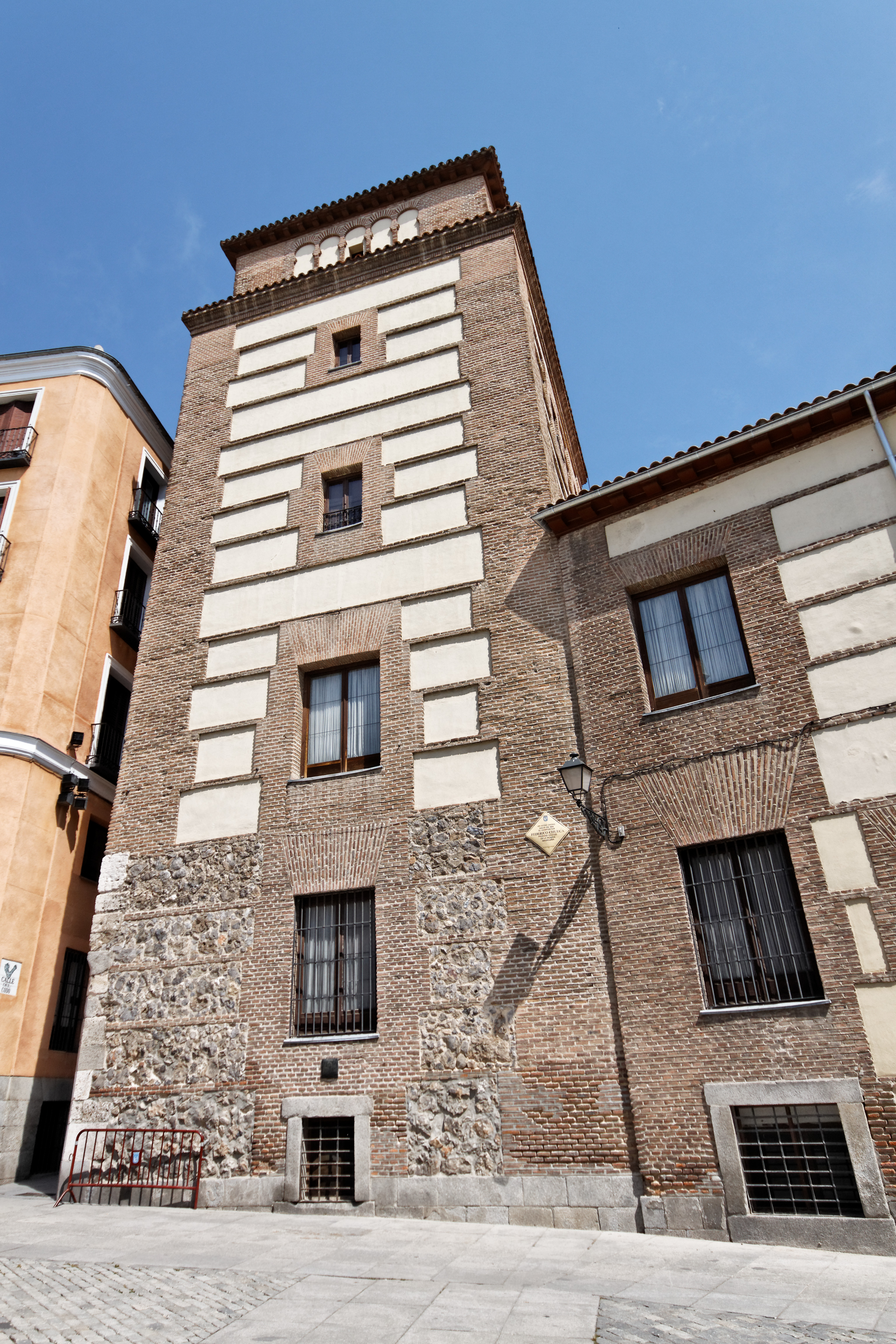 Torre de los Lujanes, ubicada en la Plaza de la Villa, Madrid.